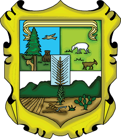 Escudo de Armas de MIQUIHUANA Tamaulipas